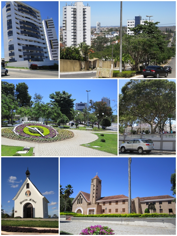 Montagem Garanhuns, Pernambuco, Brasil.